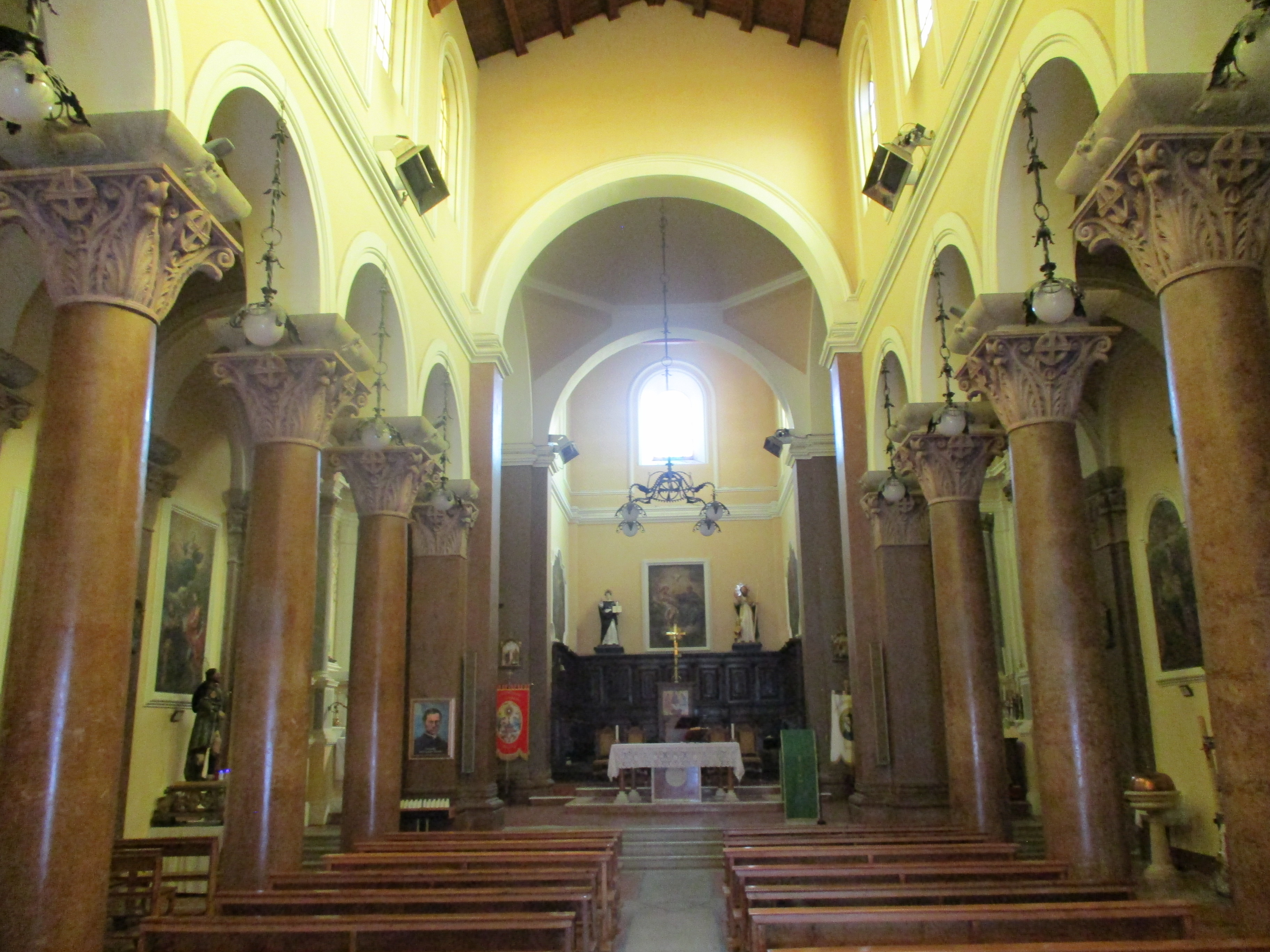 Interno della chiesa della Santissima Trinità